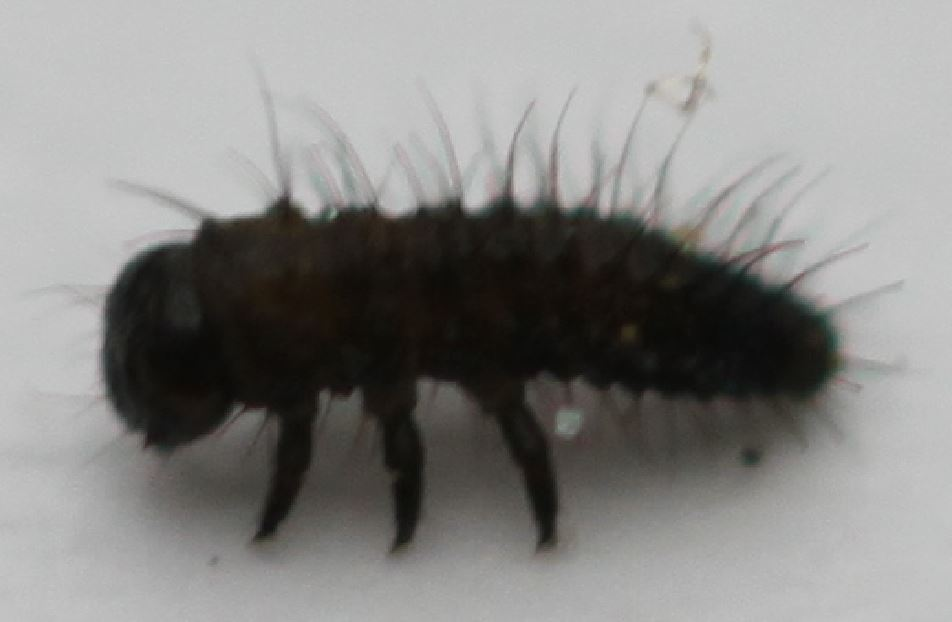 Frisch geschlüpfte Larve des Rainfarn-Blattkäfers (Galeruca tanaceti)